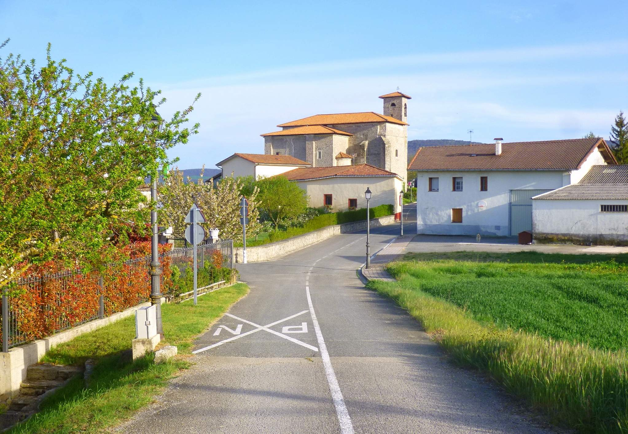 Margarita (Vitoria, Álava)